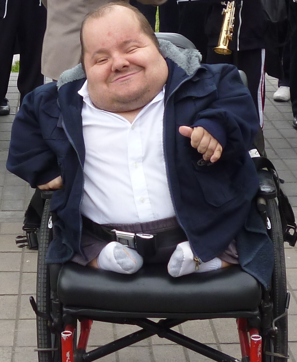 Gian Carlo Vacchelli Congressman